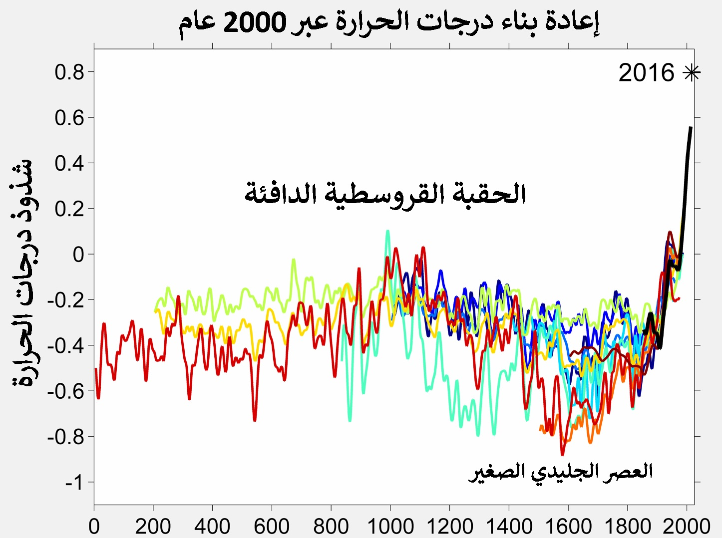 اعادة بناء درجات الحرارة على مدى 2000 عام